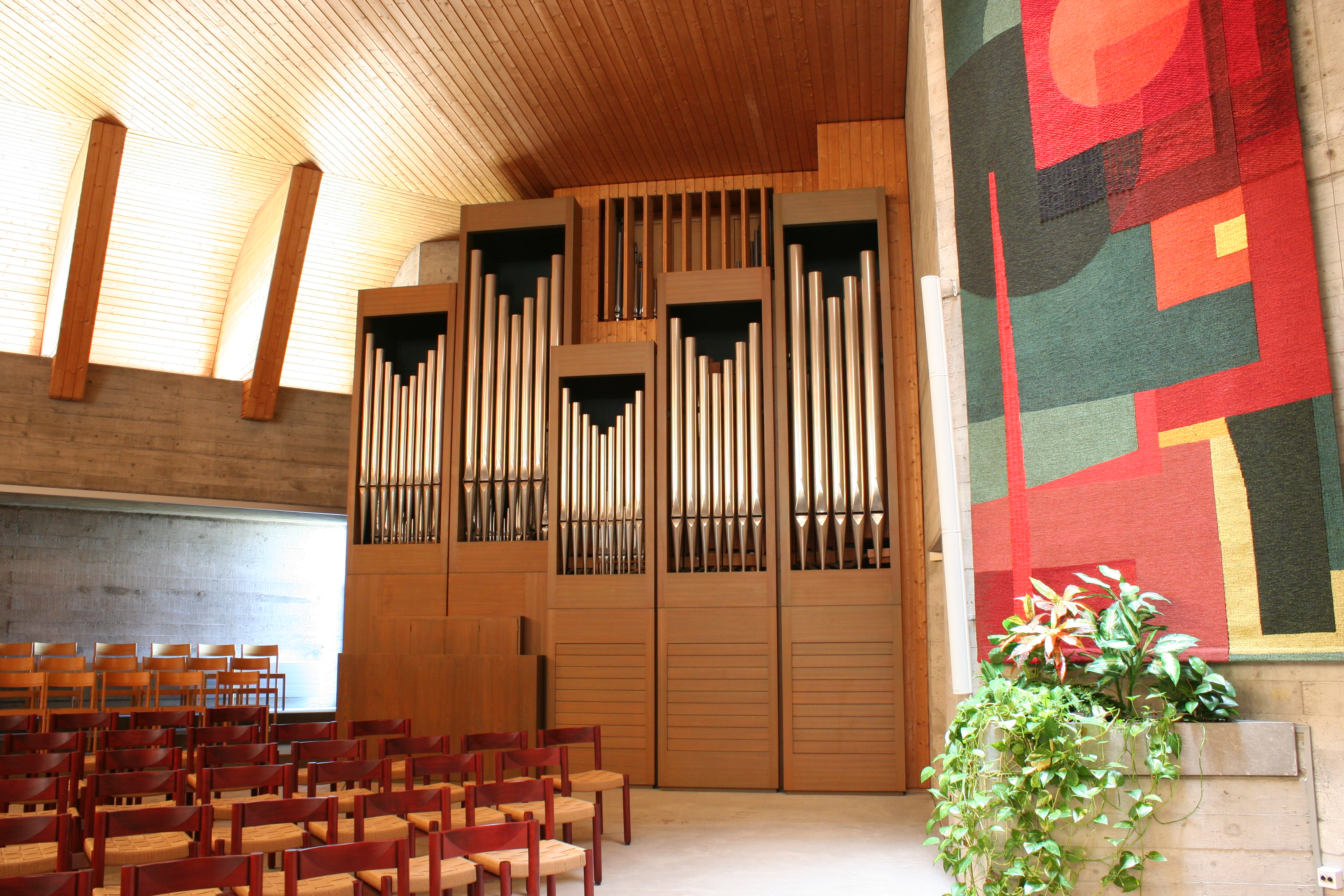 Römisch-katholische Pfarrkirche St. Martin Seuzach